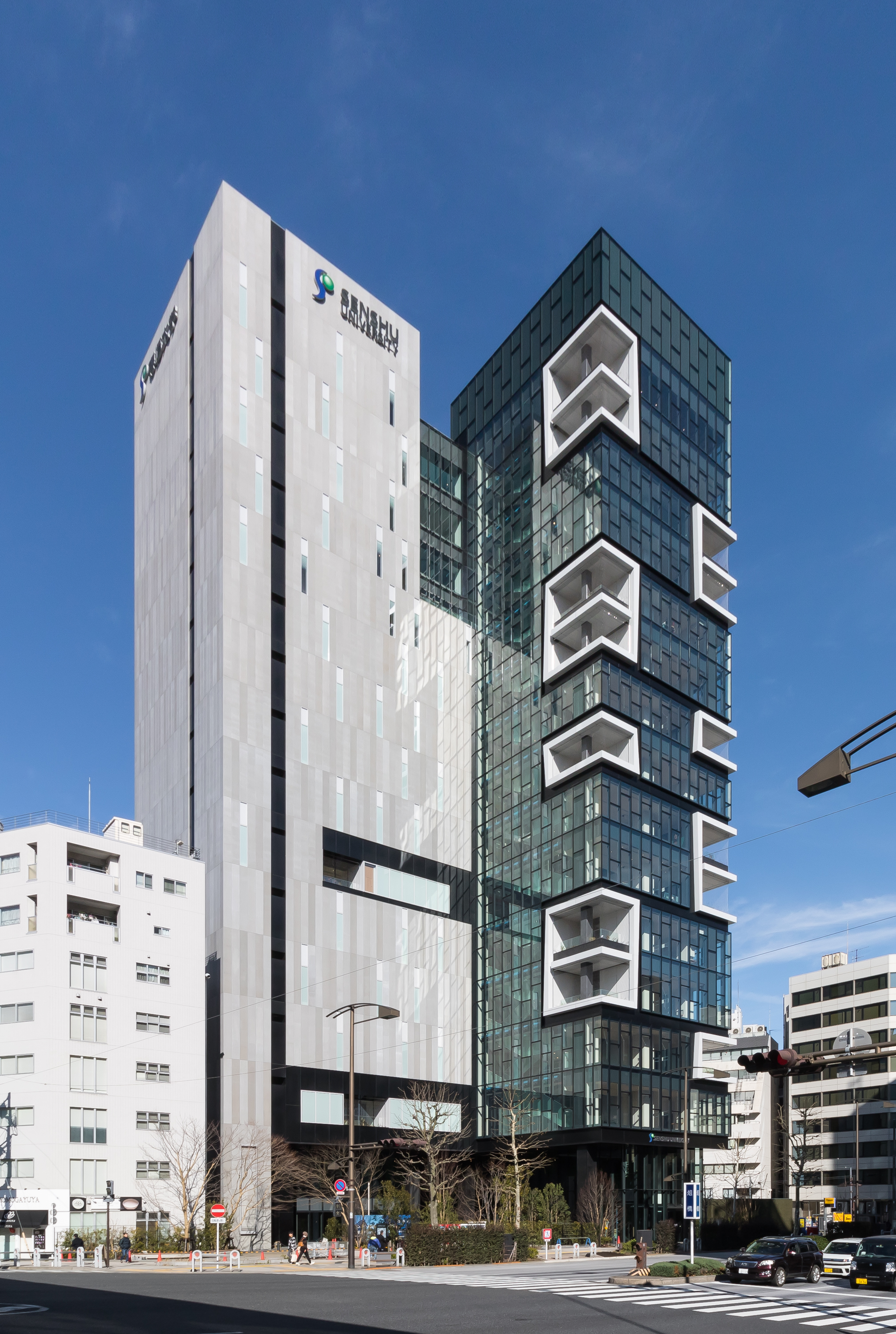 専修大学神田新校舎